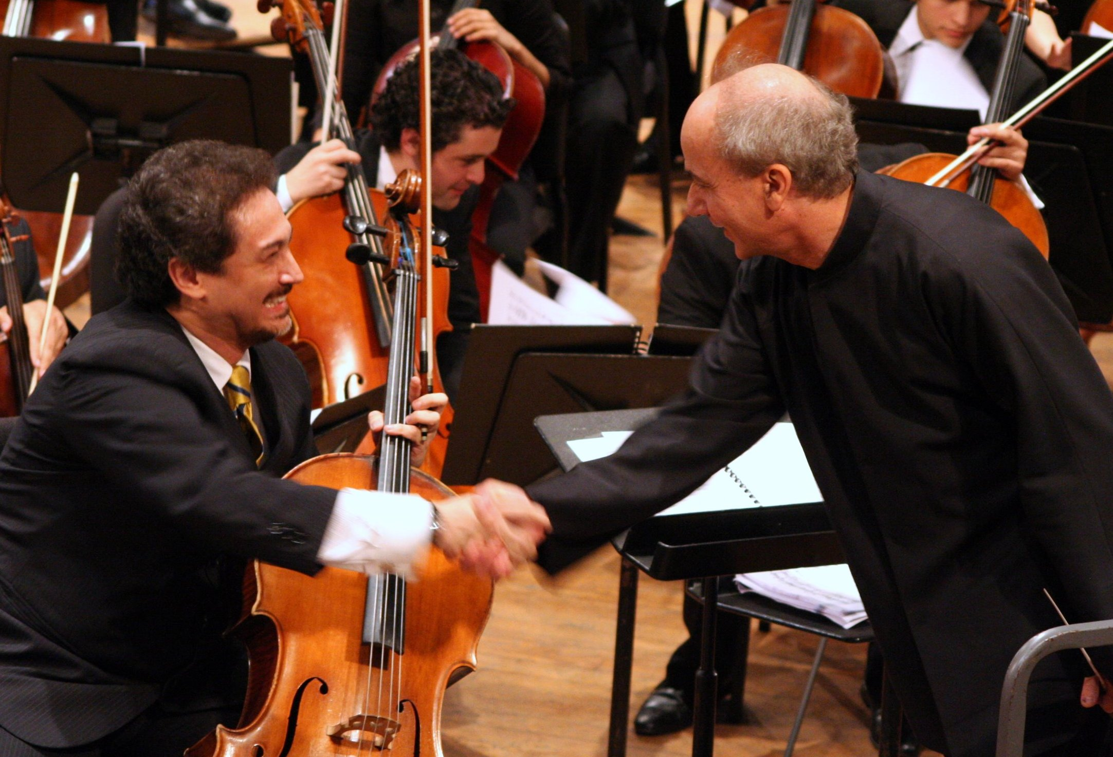 William Molina Cestari Concierto Oblivion en el Teatro Teresa Carreño de Venezuela, junto al Director de Orquesta Eduardo Marturet (2009)